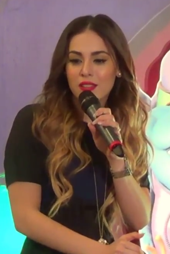 Danna Paola habla de su personaje en Home